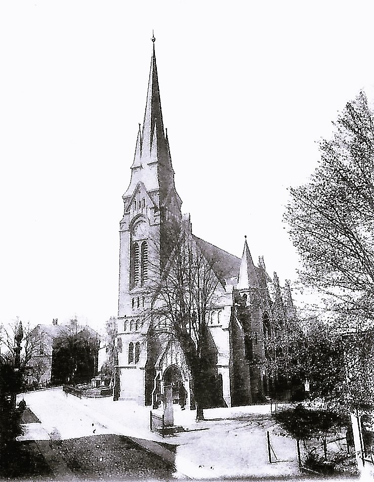 St. Lorenzkirche, Lübeck